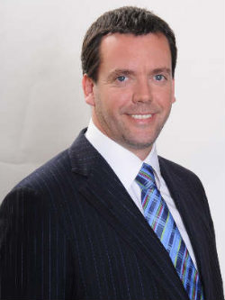 Felipe Harboe Bascuñán